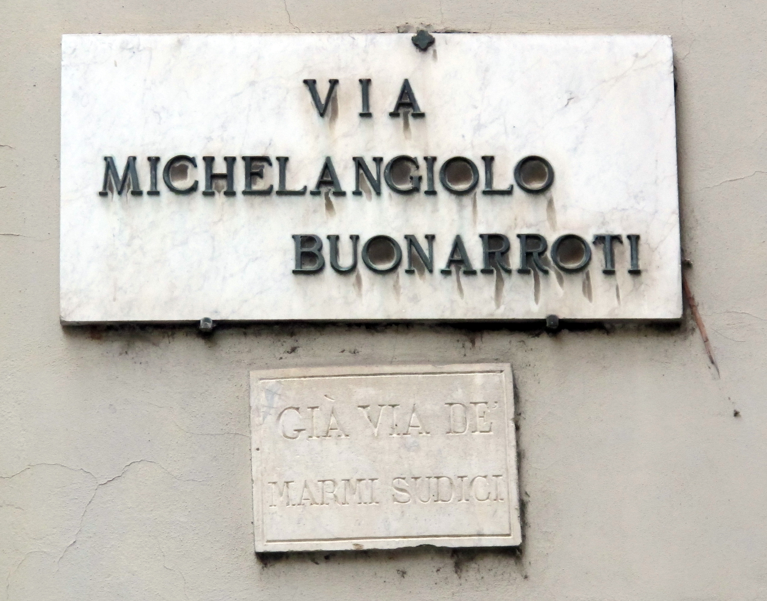 Via michelangiolo buonarroti già via de' marmi sudici